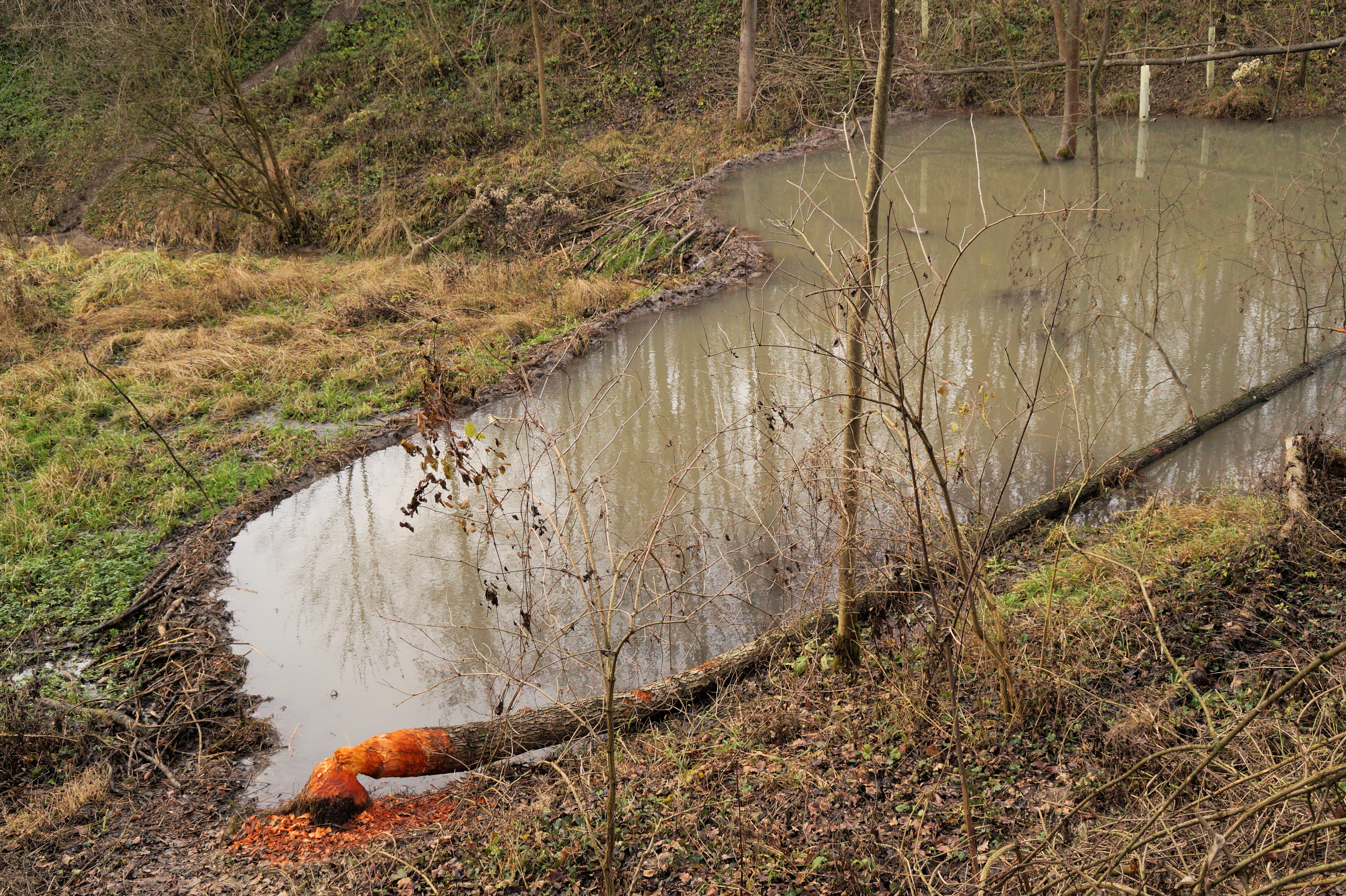 Biberdamm - Hippersdorf - Dez. 2015